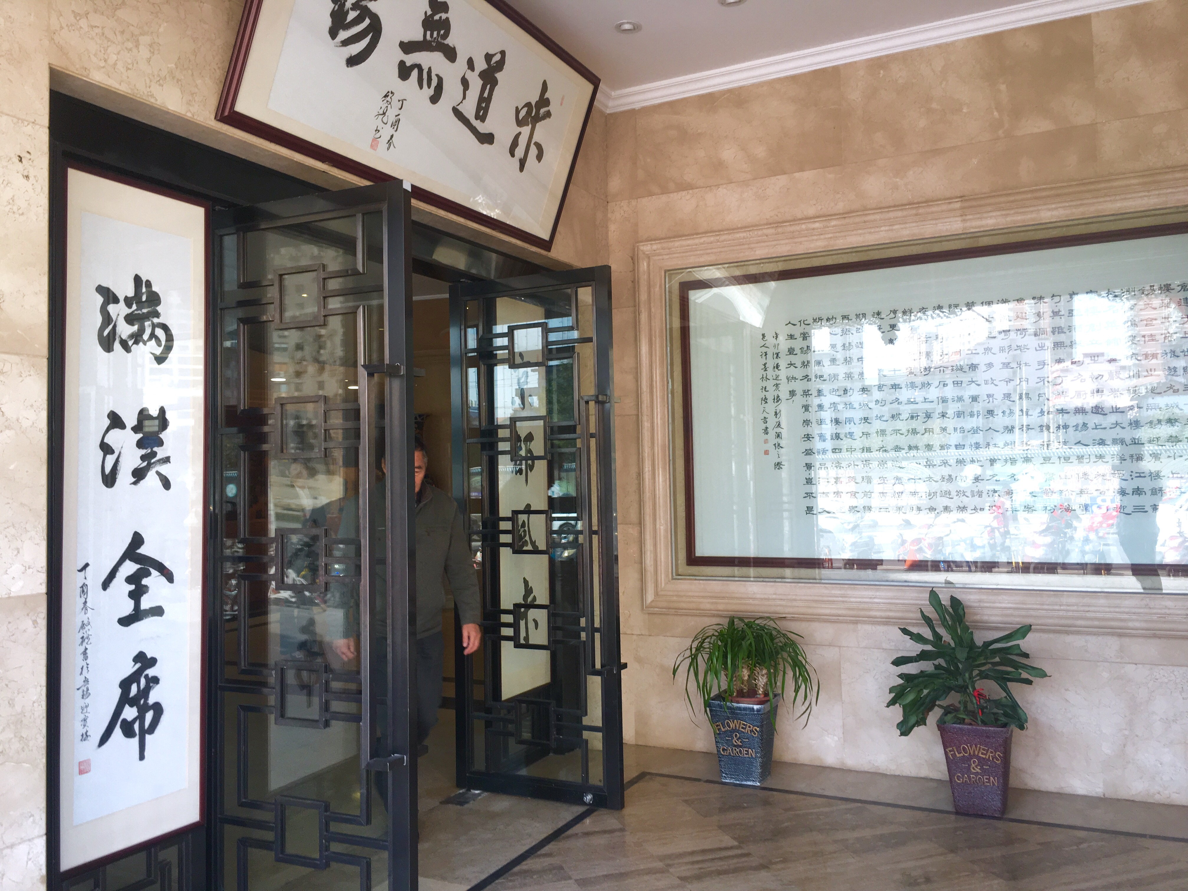 迎賓樓大門